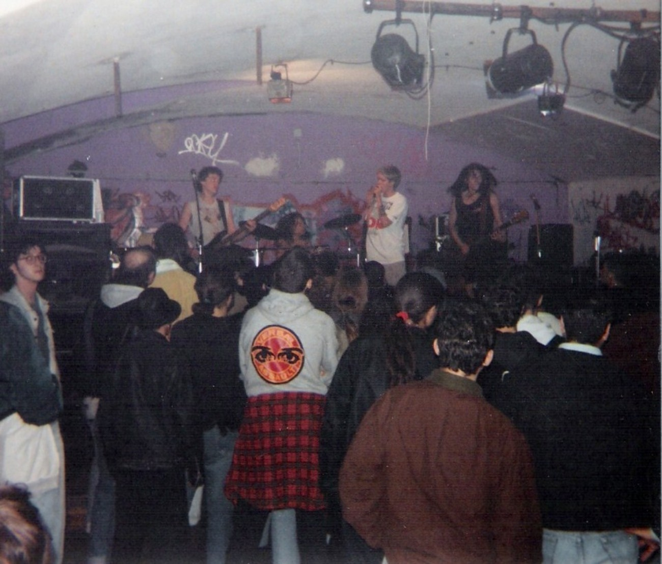 Concerto dei Life... But How to Live It? all'Isola nel Kantiere, Bologna, 11 novembre 1990